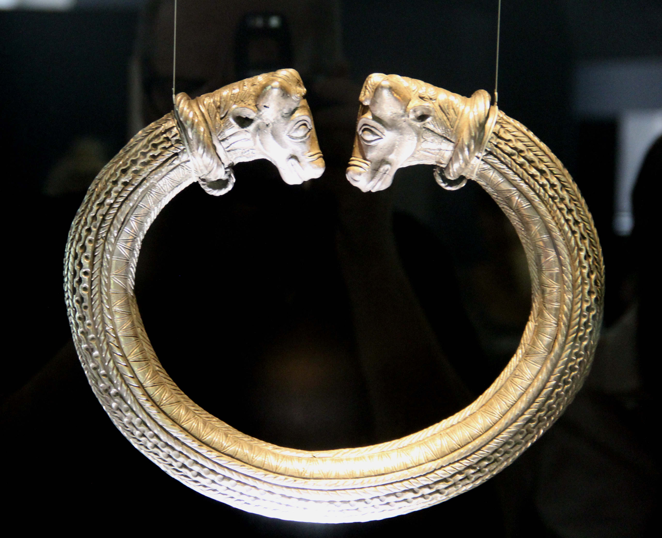 Silberring von Trichtlingen, Spätlatènezeit, 1. Jh. vor Chr.